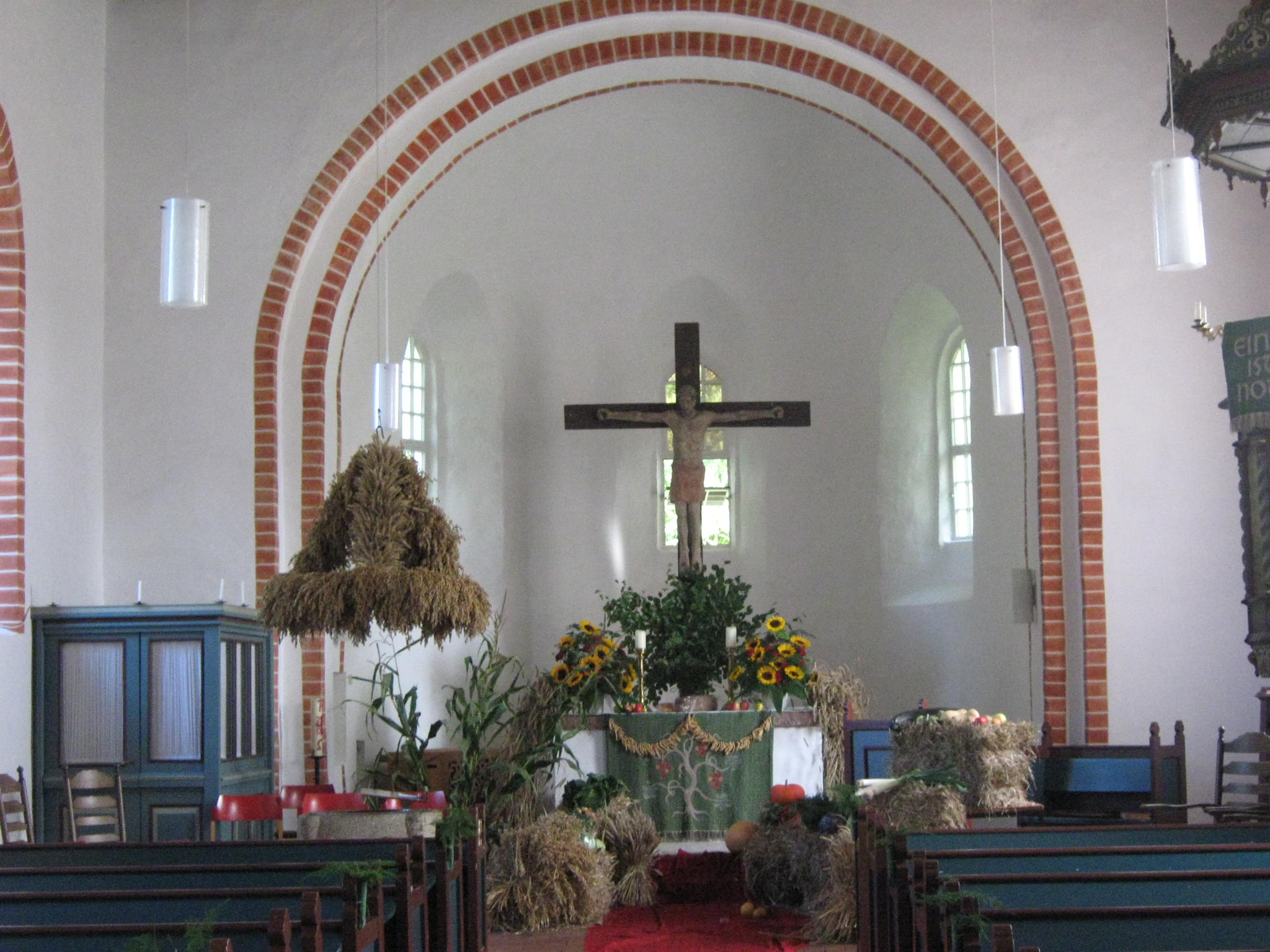 Apsis der Kirche in Dunum, Ostfriesland, Niedersachsen, Deutschland